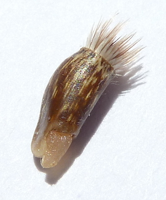 Centaurea seridis (Arzolla) - cipsela con su vilano de escamas y el eleosoma - Cabezo de Pallarés, Albatera, Alicante (España)